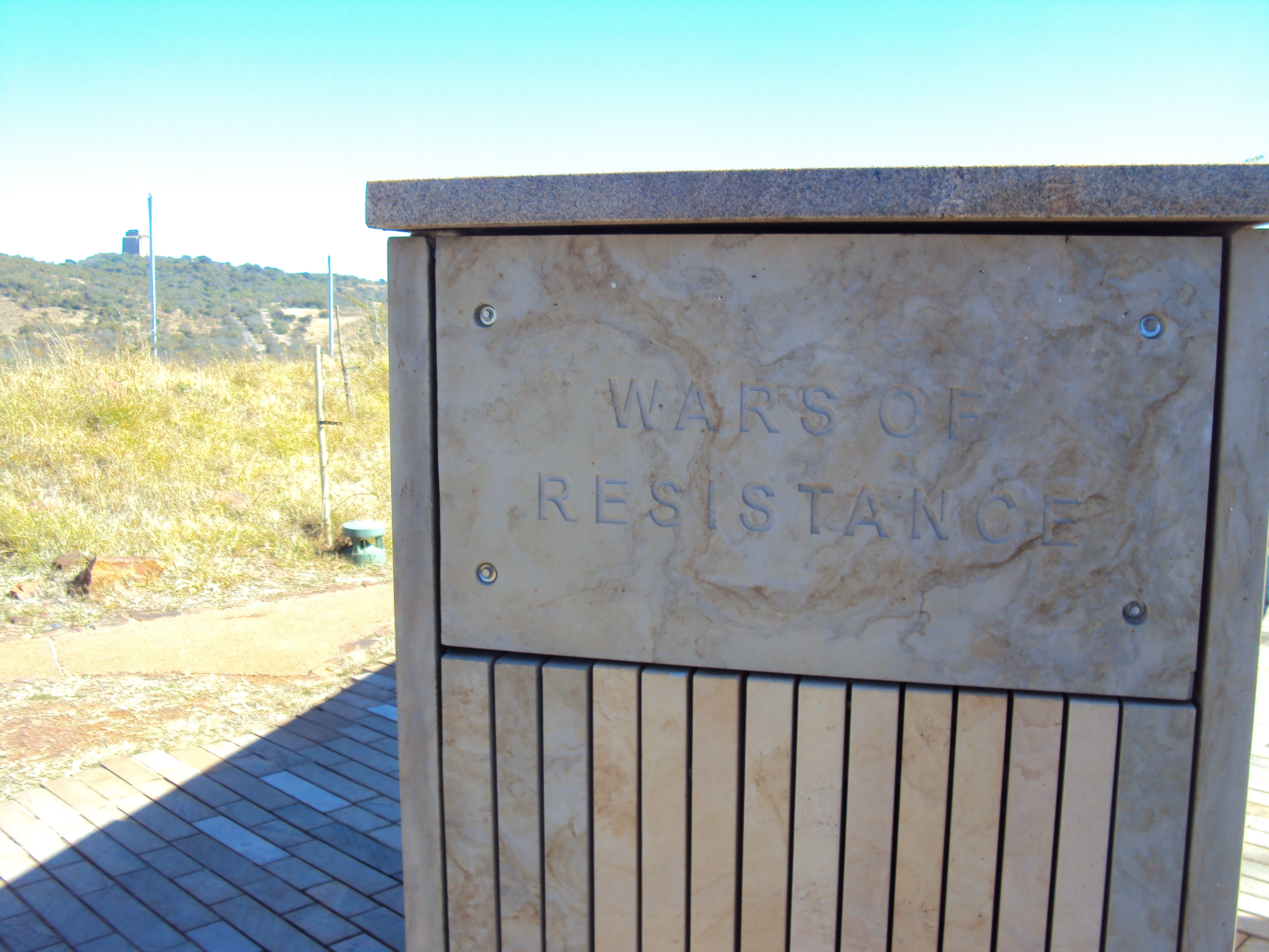 Memorial a las víctimas de las Guerras Sudafricanas. Freedom Park.